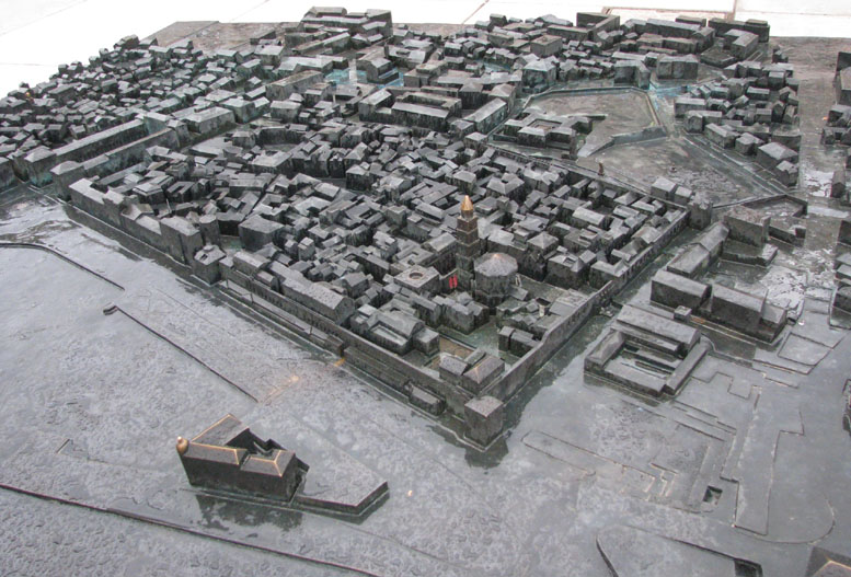 Dioklecijanova palača, maketa na splitskoj Rivi